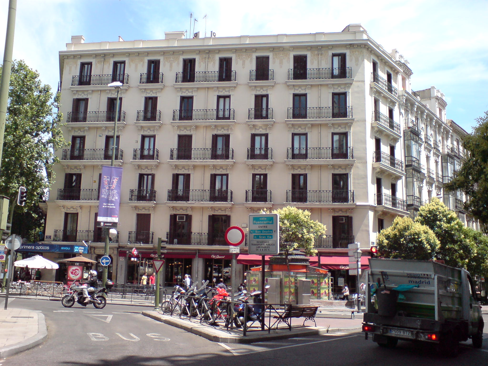 Edificio en cuyos bajos está el Café Comercial, ela Glorieta de Bilbao, Madrid